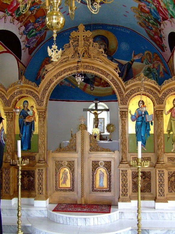 Beloiannisz görög ortodox templom. Saját kép. Egresi János 2006. szeptember 23., 15:36 (CEST)